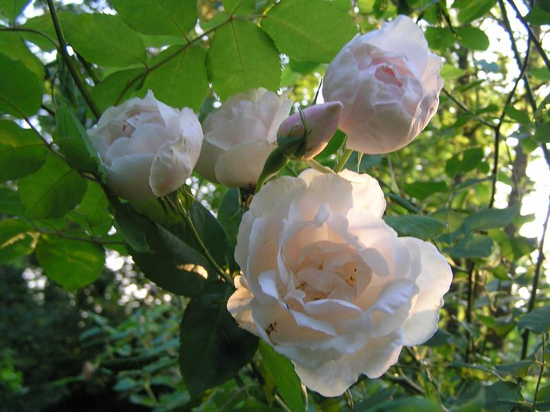 Rosa 'Mme Alfred Carrière'